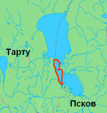 Место Теплого озера в Псковско-Чудском озёрном комплексе